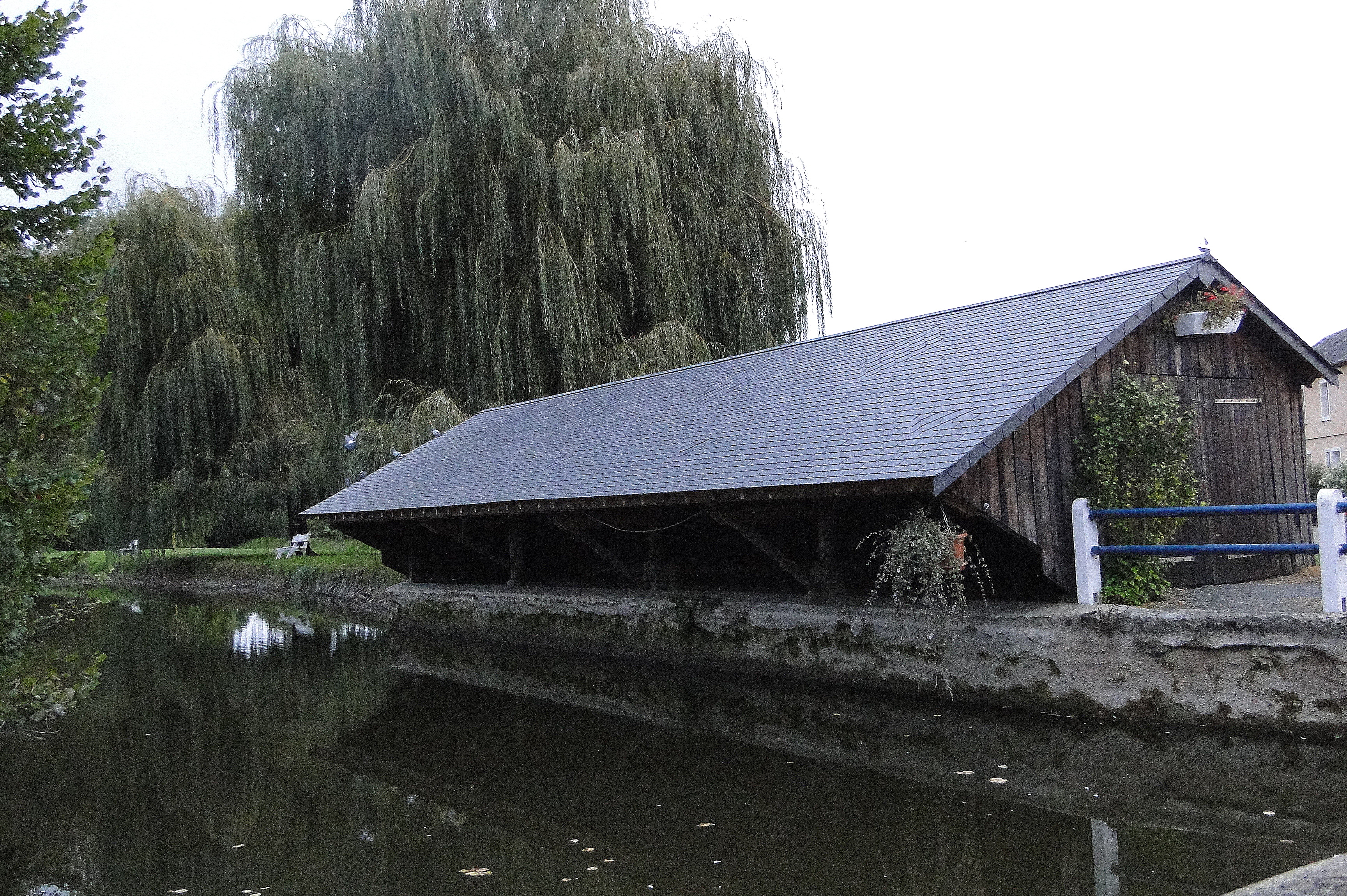 Lavoir de Oizé (Sarthe)